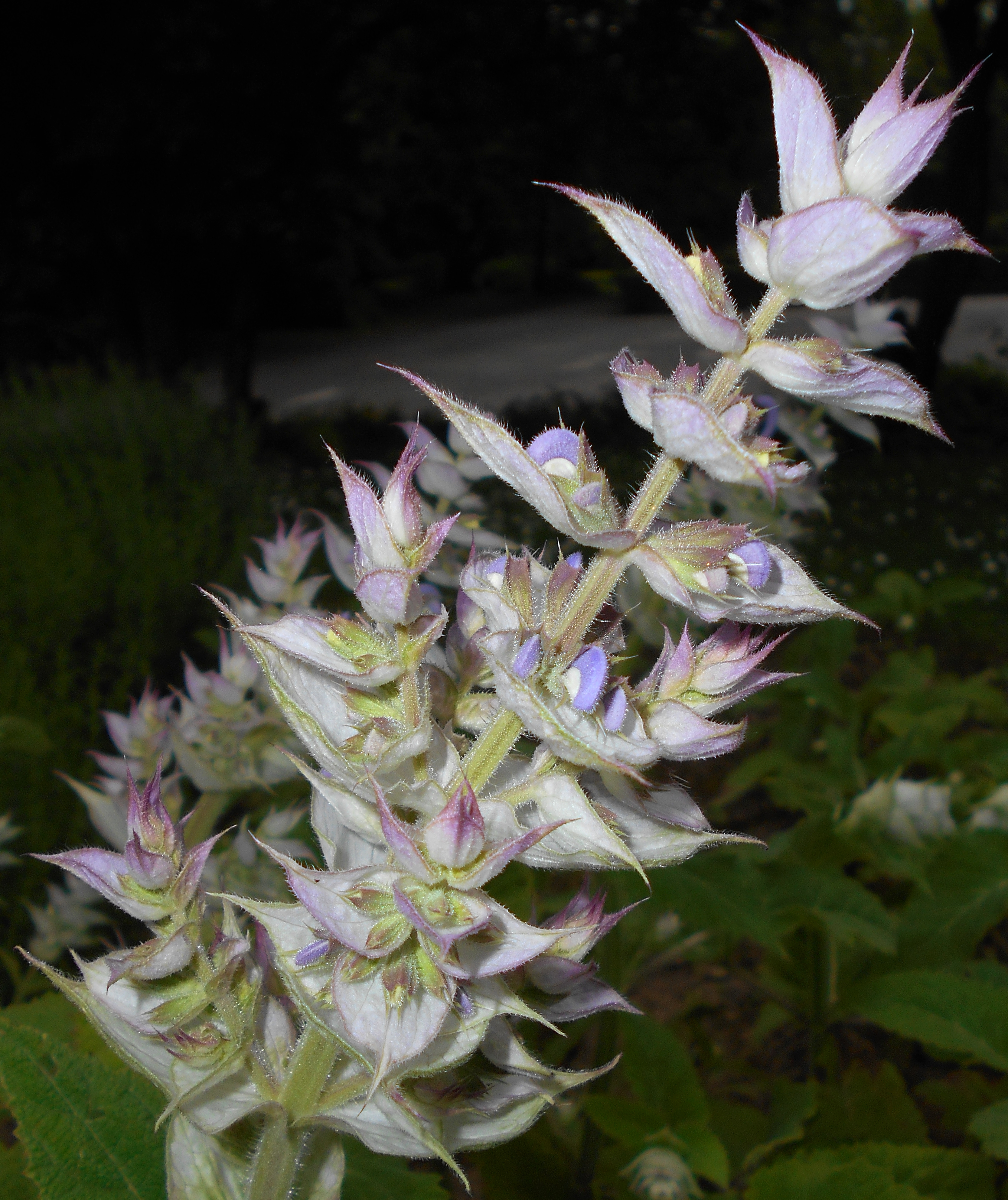 Szałwia muszkatołowa (Salvia sclarea), Ogród Botaniczny UMCS, Lublin, Polska.